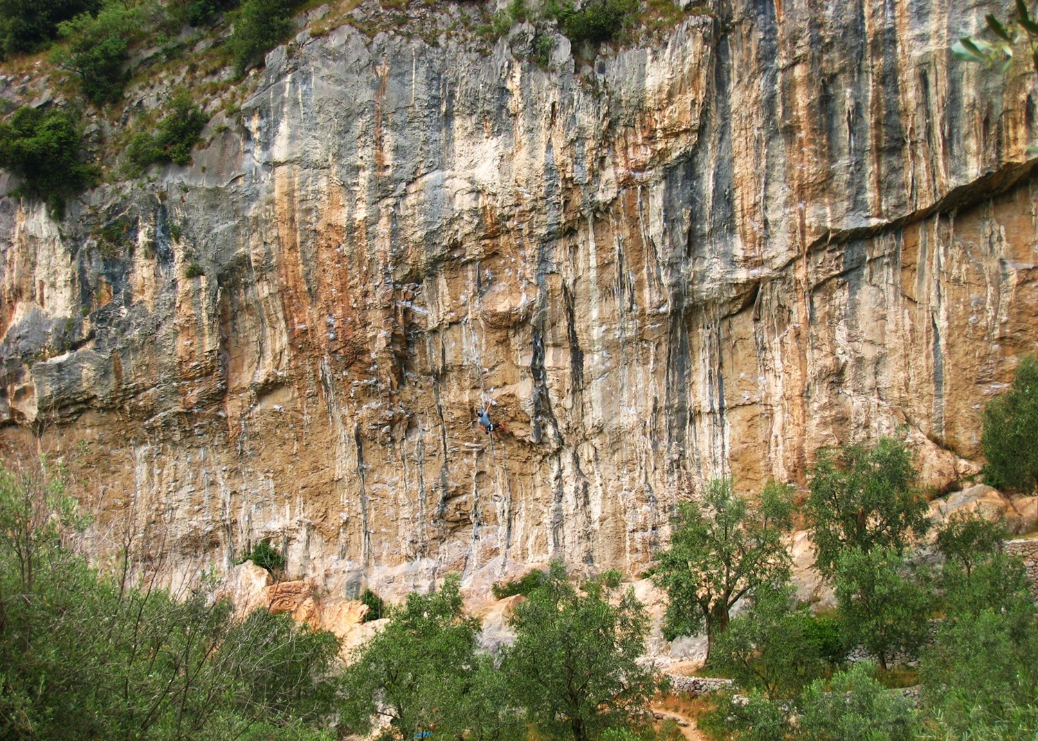 Deuxième secteur de G de Policromuro, dévers du 6b au 8a. Un grimpeur dans Deasy, 6c.